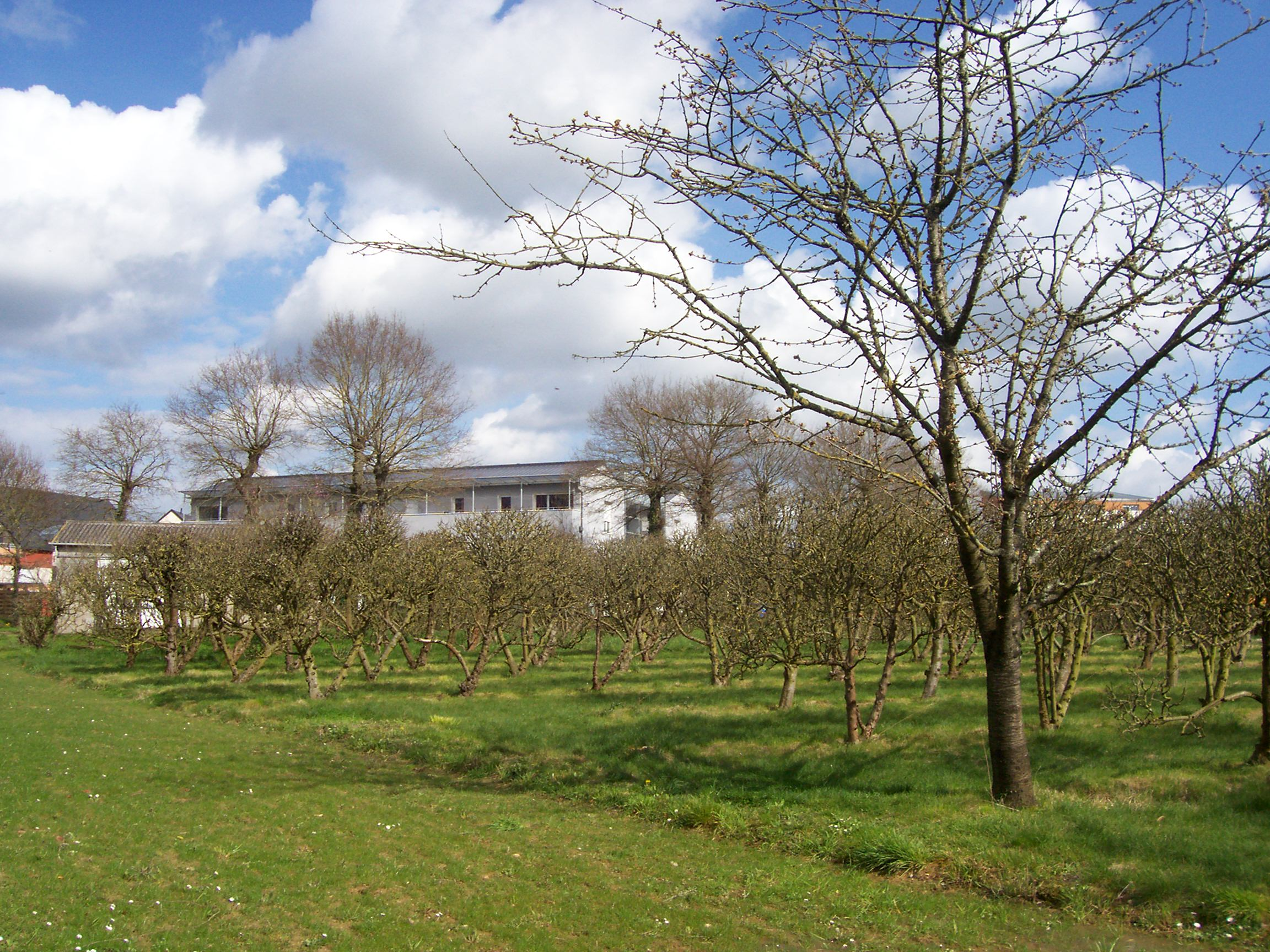 Verger de fruitiers dans la commune de Mordelles, Ille et Vilaine, France. Le verger se situe à proximité immédiate d'immeubles collectifs.